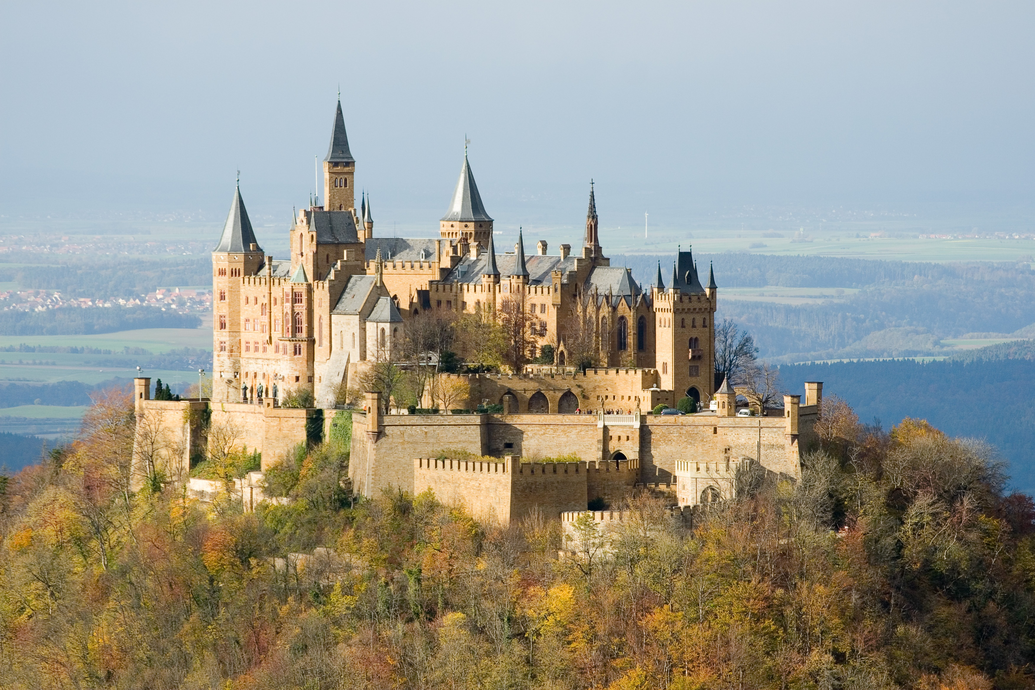 Burg Hohenzollern